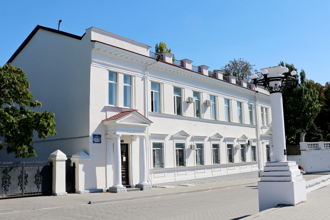 Корпус Севастопольского государственного университета на Корнилова, 1. Здесь расположены Институт дополнительного профессионального образования и Институт развития города Севастопольского государственного университета